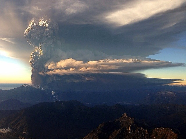 Calbuco